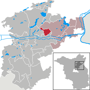 Britz in Brandenburg (Country) - District Barnim